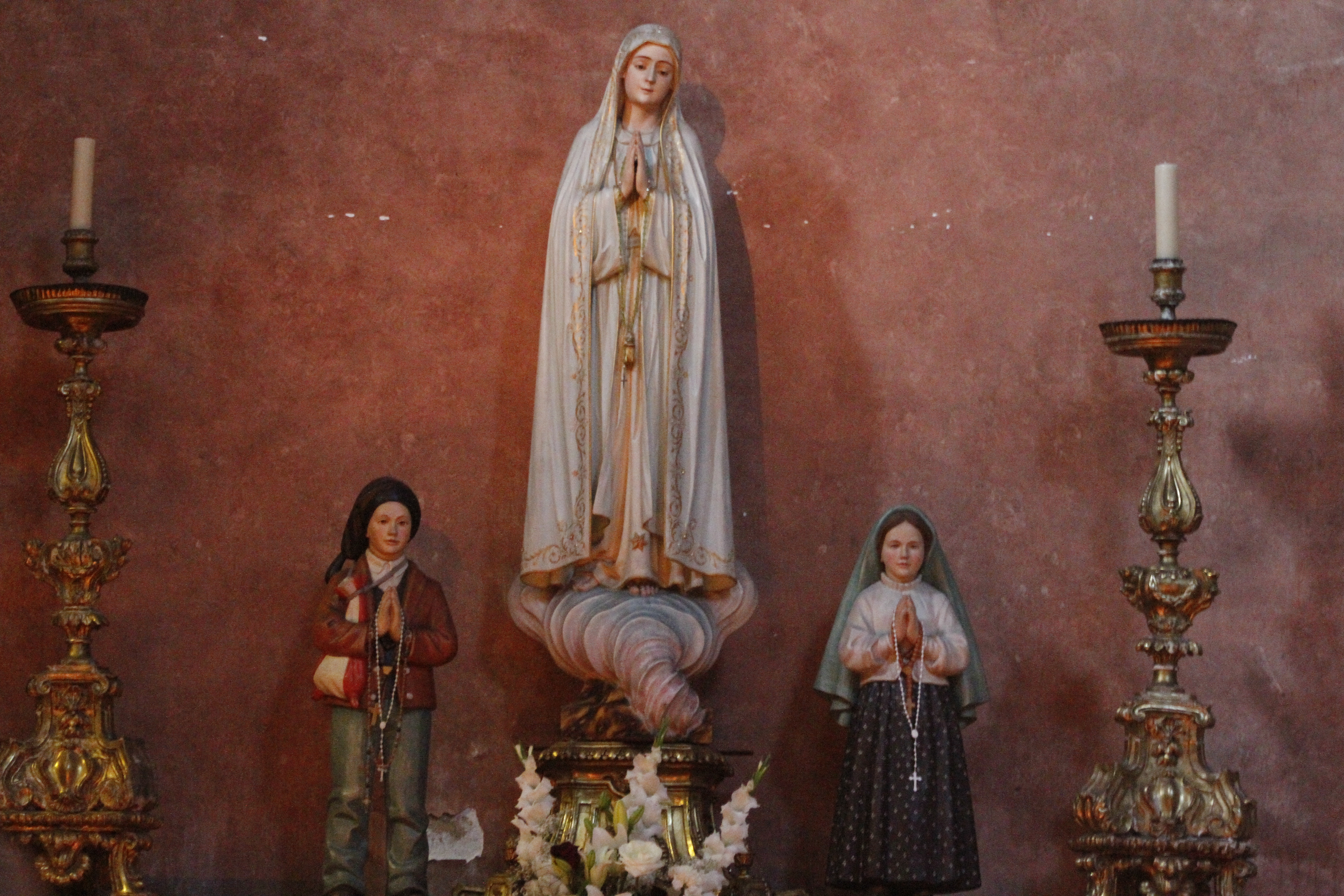 Nossa Senhora de Fátima e os pastores - Igreja de São Domingos